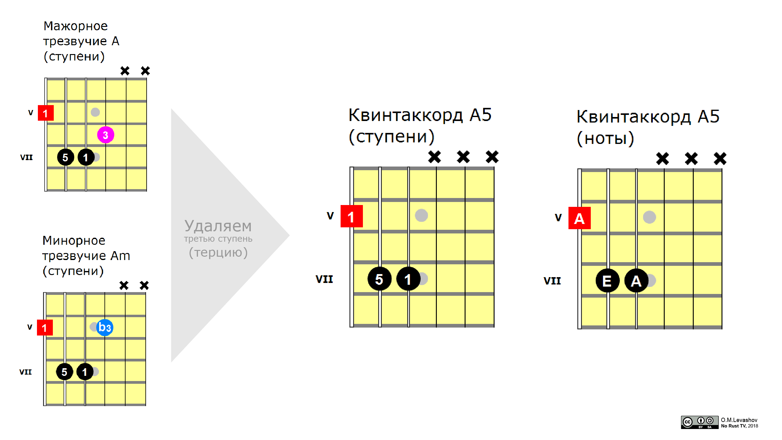 Ступени входящие в квинтаккорд